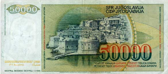 50000 Yugoslav dinars note (1988)